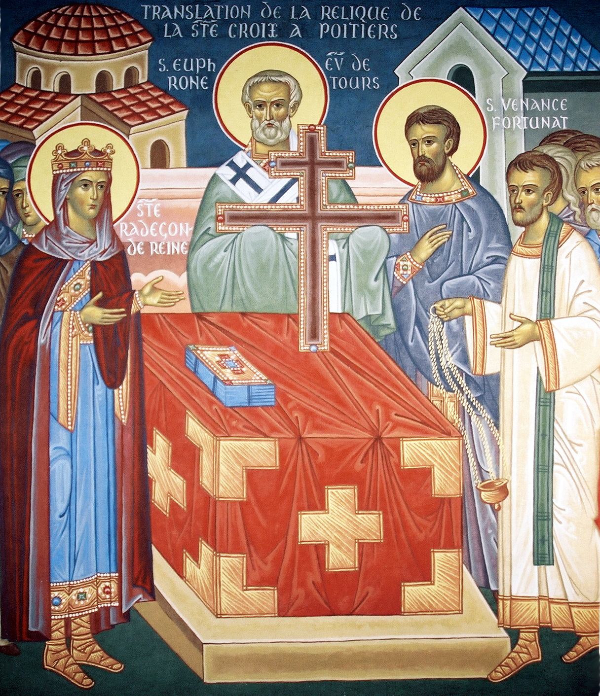 Перенесение частицы Креста Господня из Константинополя в Пуатье. Фреска Добрыниных Я. и Г. в православном монастыре прп. Антония Великого (Дром, Франция).